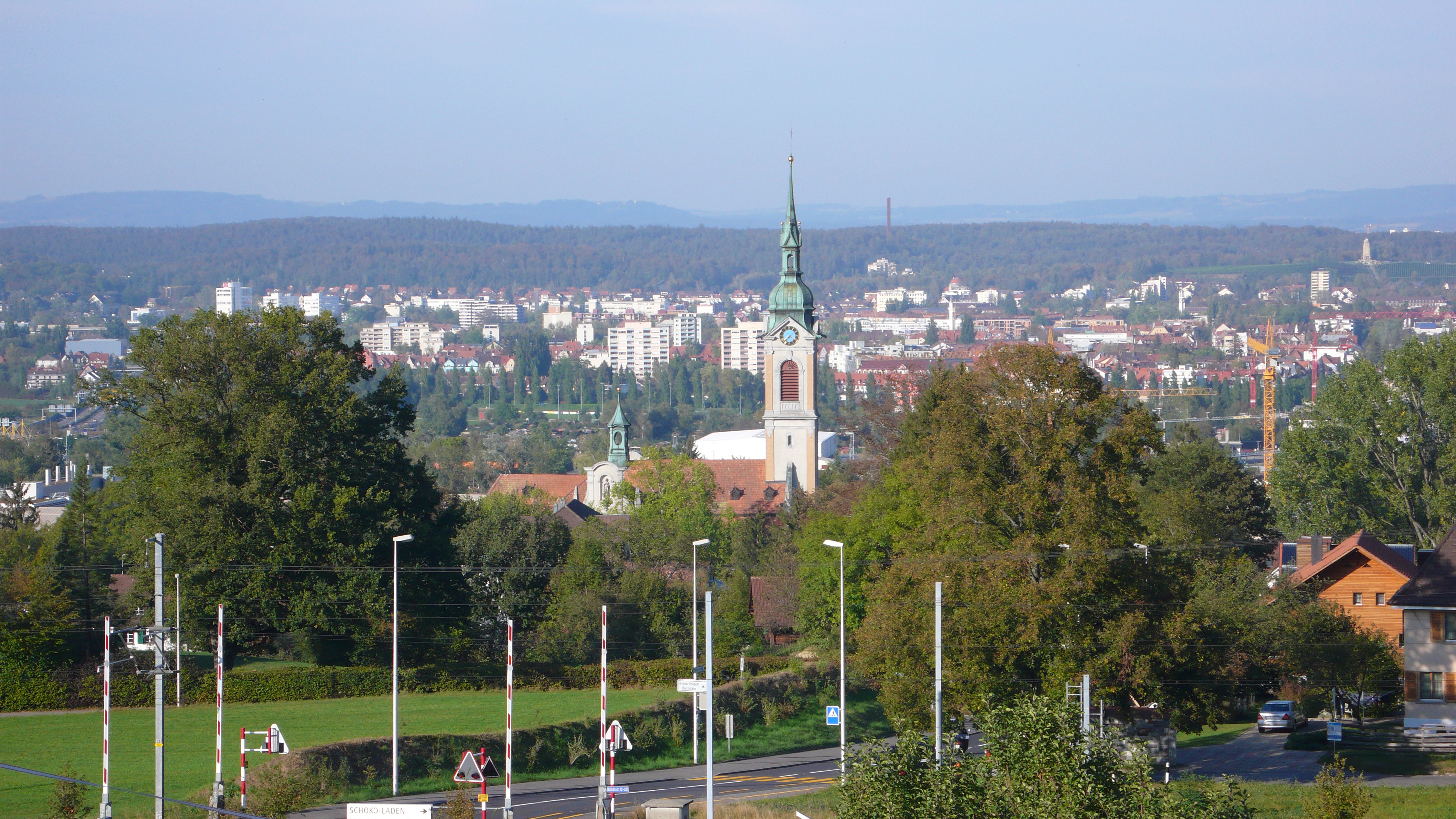 Kirche St. Stefan in Kreuzlingen mit Konstanz (D) im Hintergrund